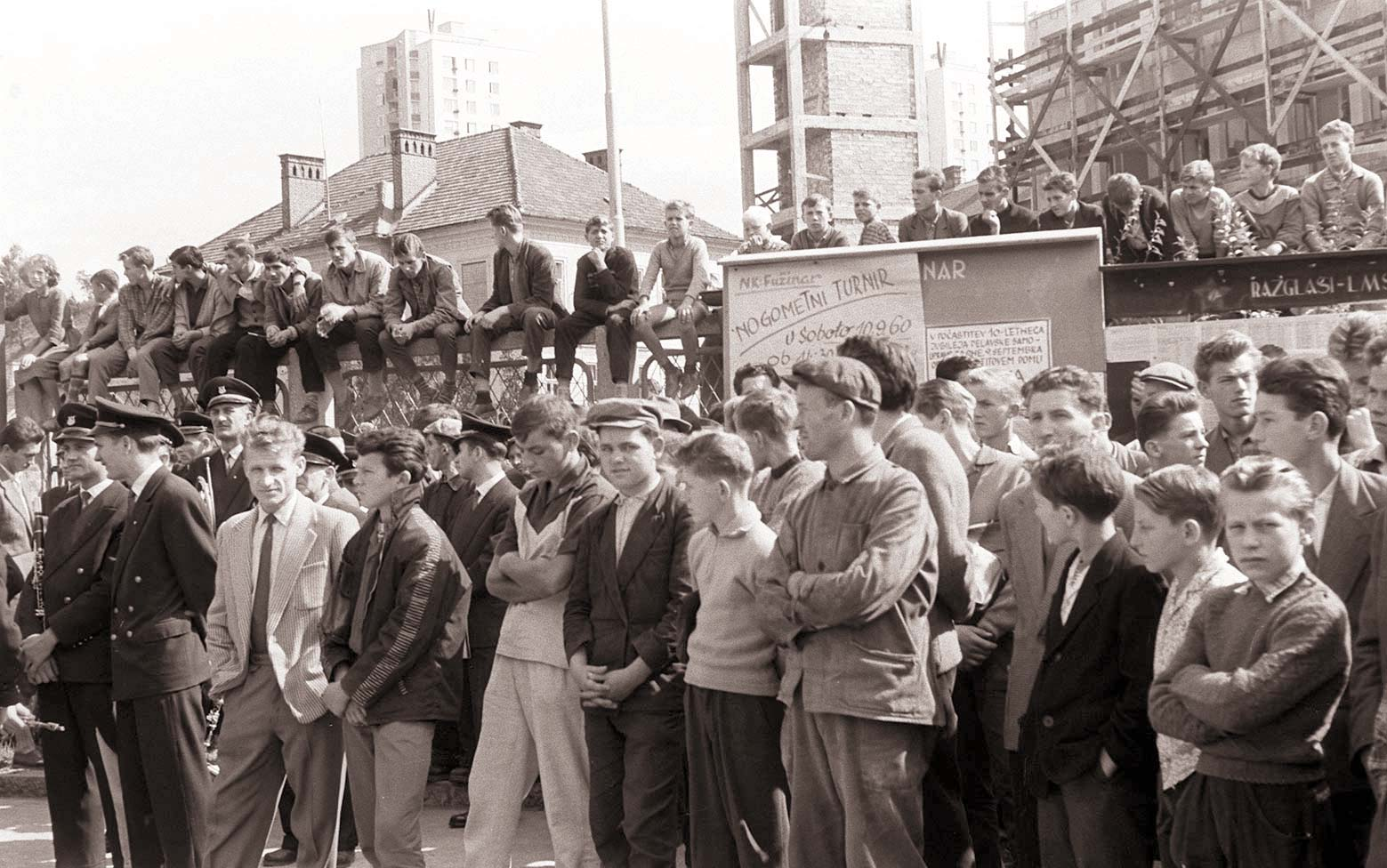 10. obletnica delavskega samoupravljanja ravenske železarne